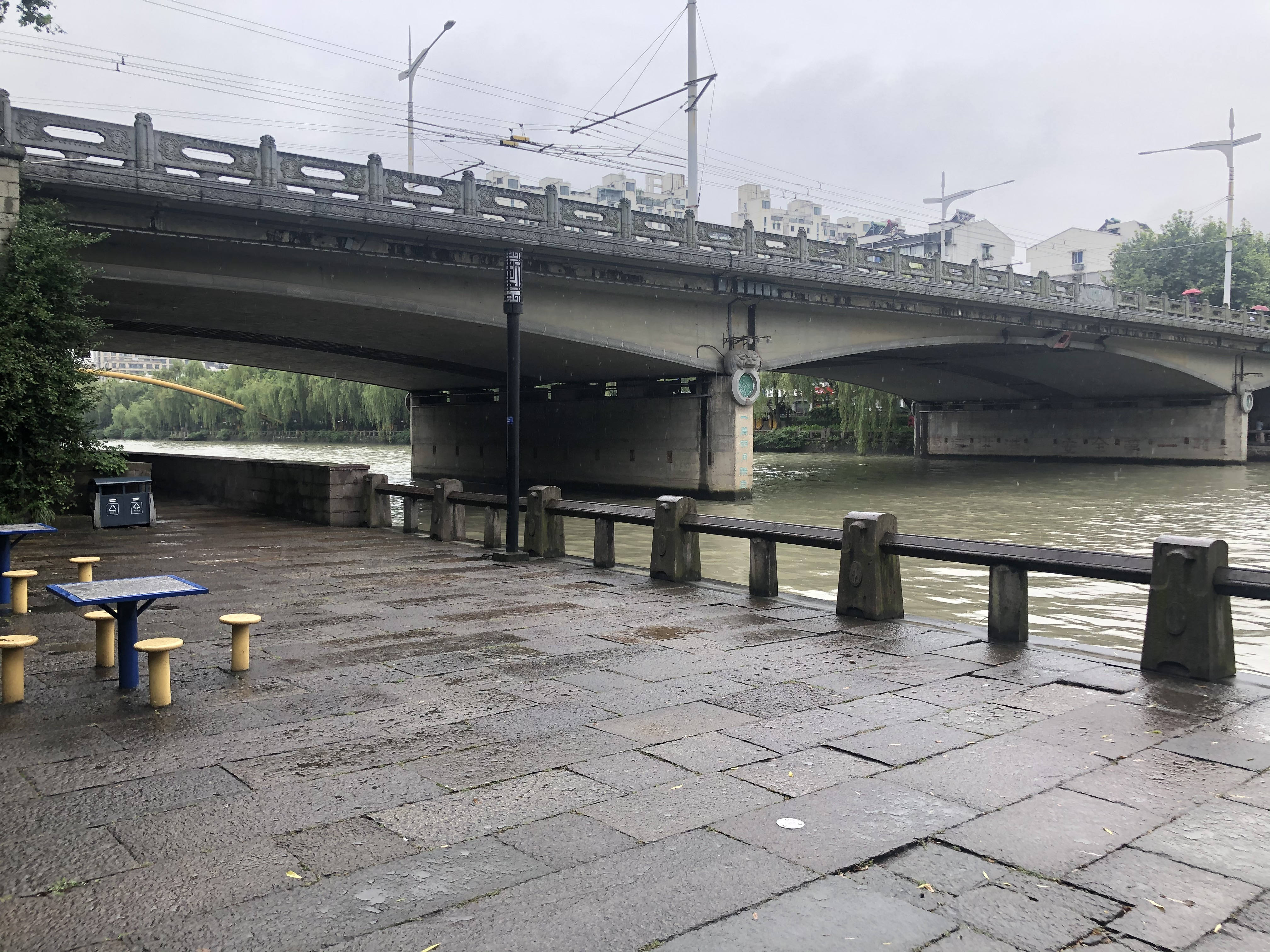 大关桥之下